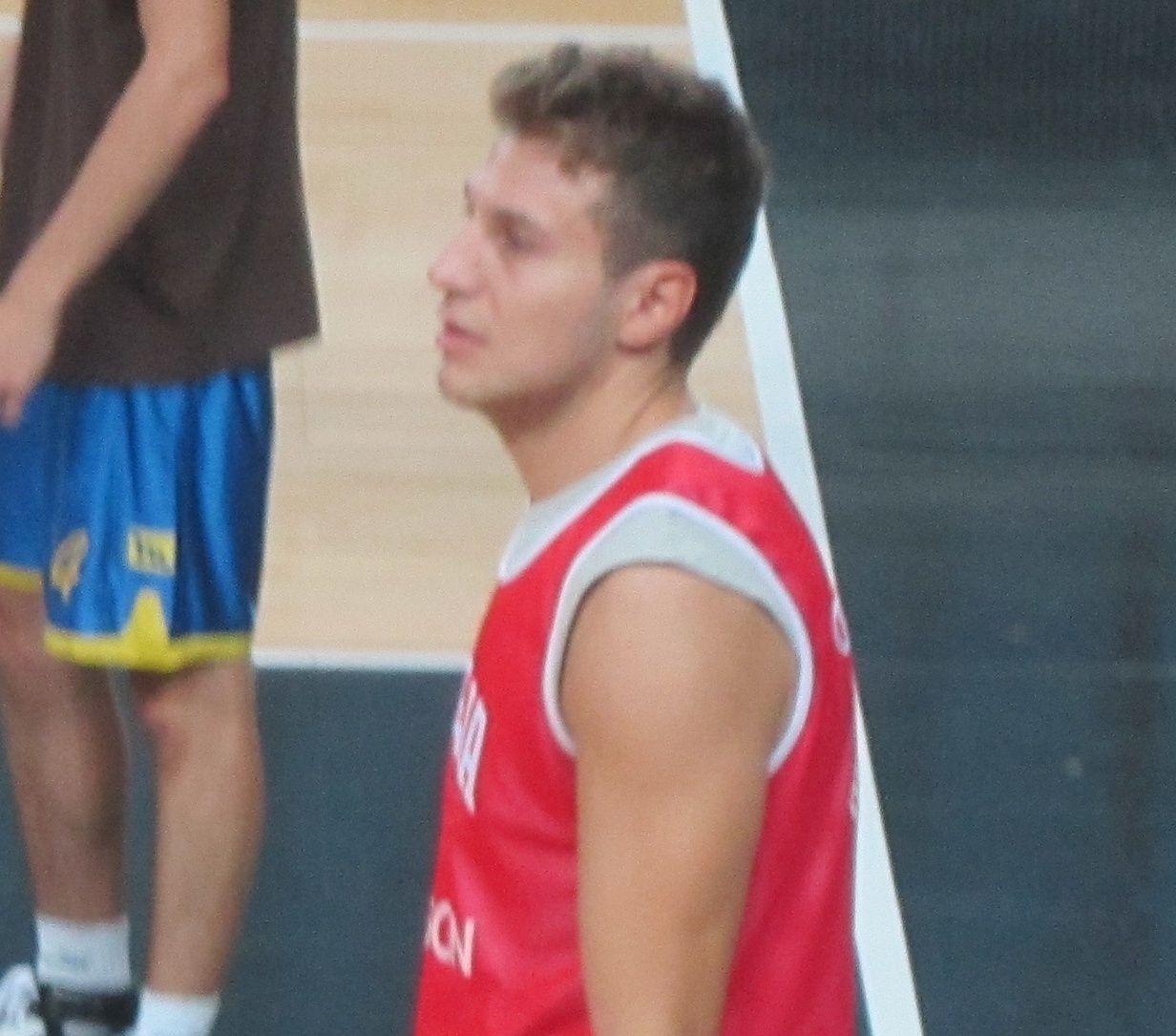 Stefano Mancinelli nell'agosto 2011 durante un allenamento in preparazione agli Europei.